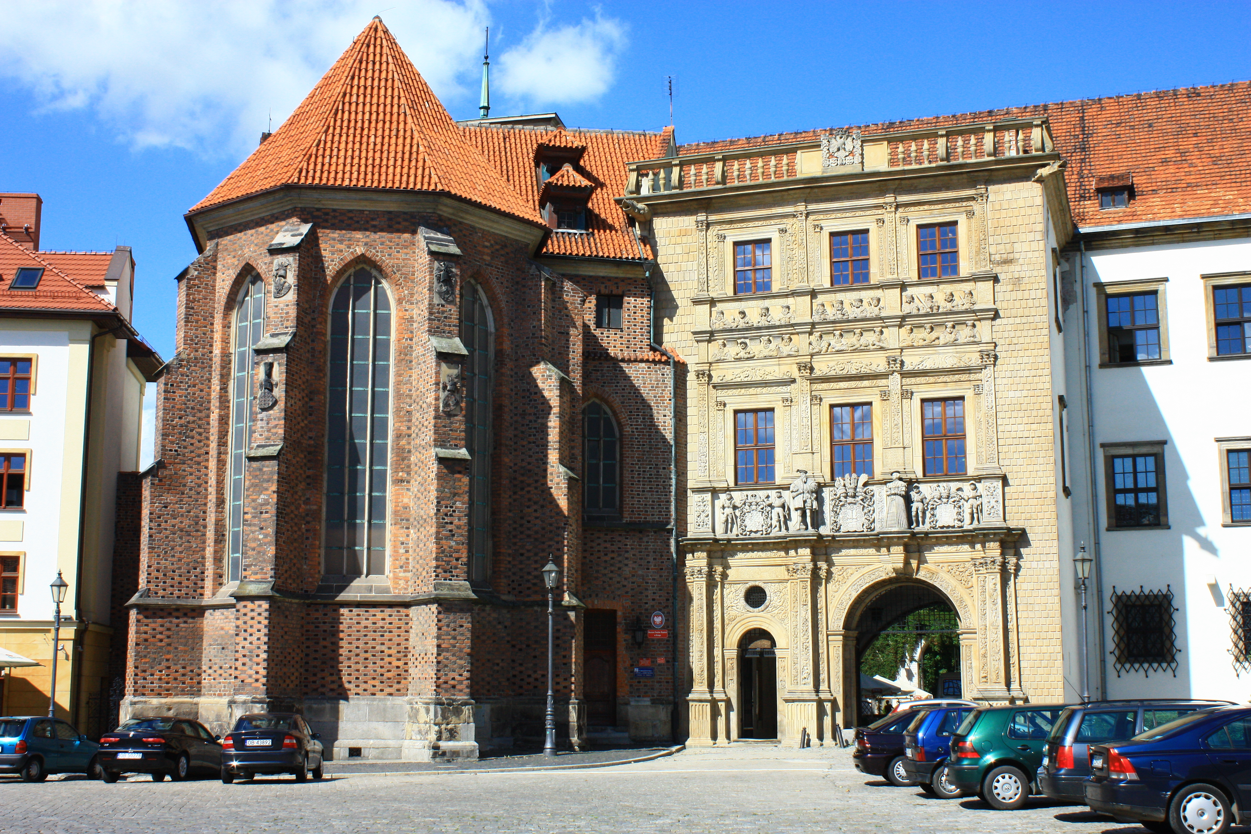 Brzeg, kościół p.w. św. Jadwigi, 1368-1371, XVI, 1783-1784